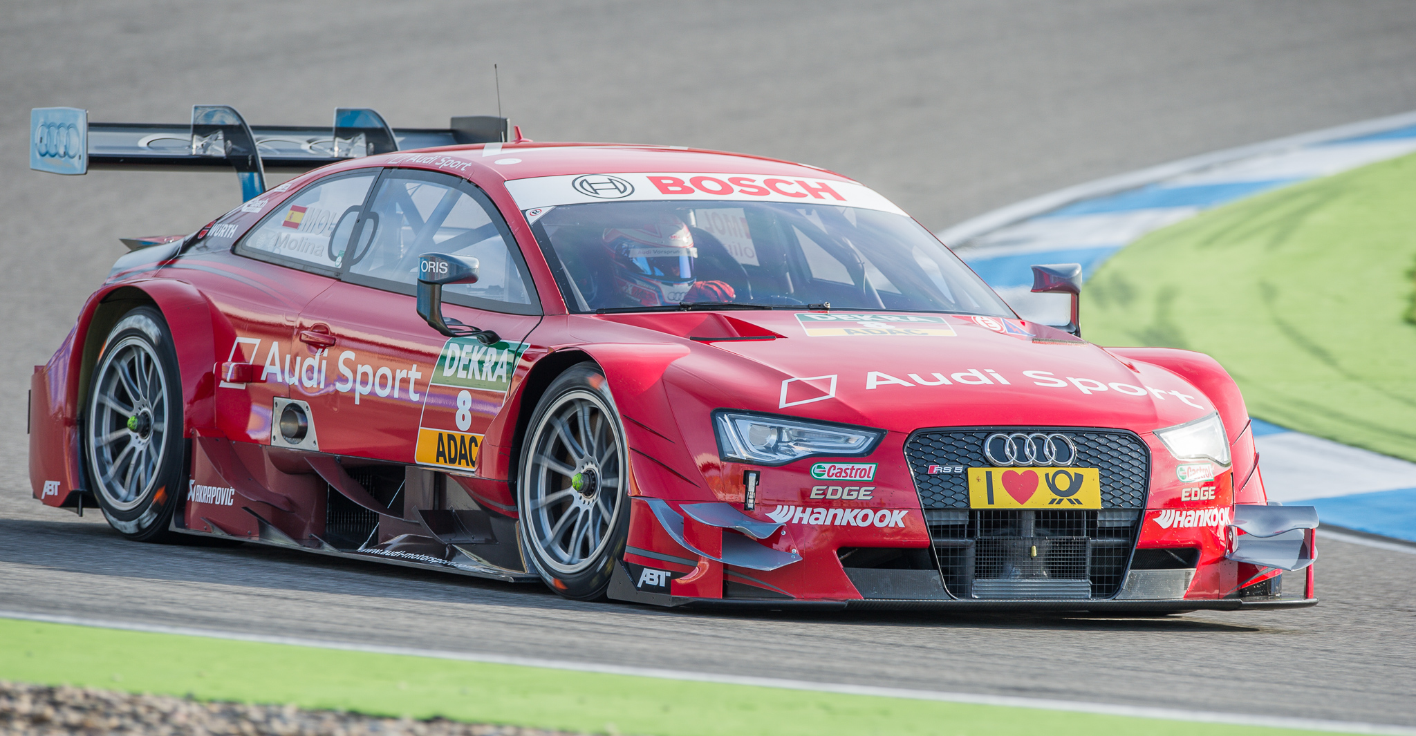 Abt Sportsline GmbH,Audi Sport Audi RS 5 DTM,DTM,Deutsche Tourenwagen Masters,Hockenheimring,Miguel Molina,Motorsport